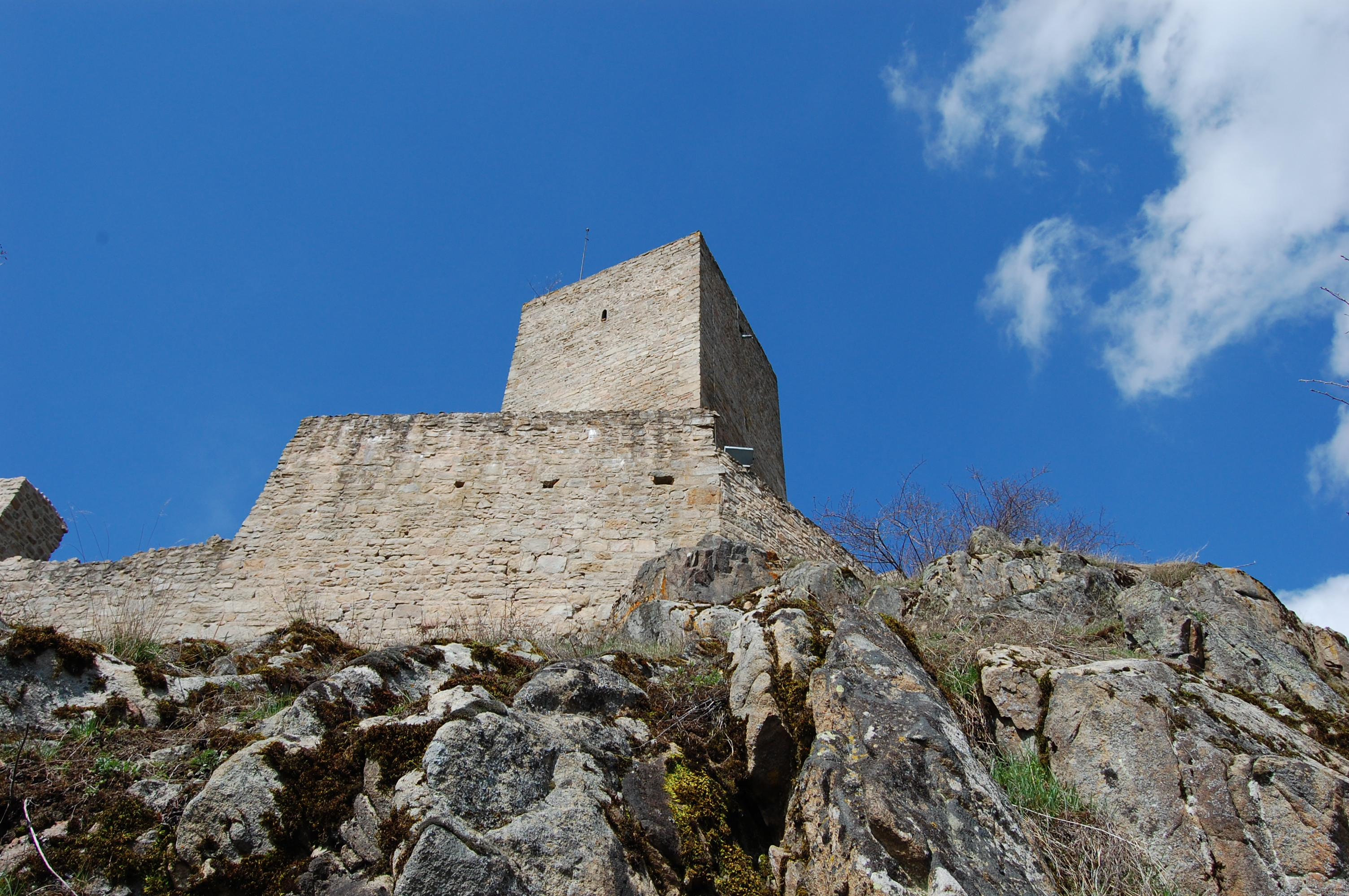 Burgruine Haus Murach in Obermurach, Stadt Oberviechtach, Landkreis Schwandorf, Oberpfalz, Bayern